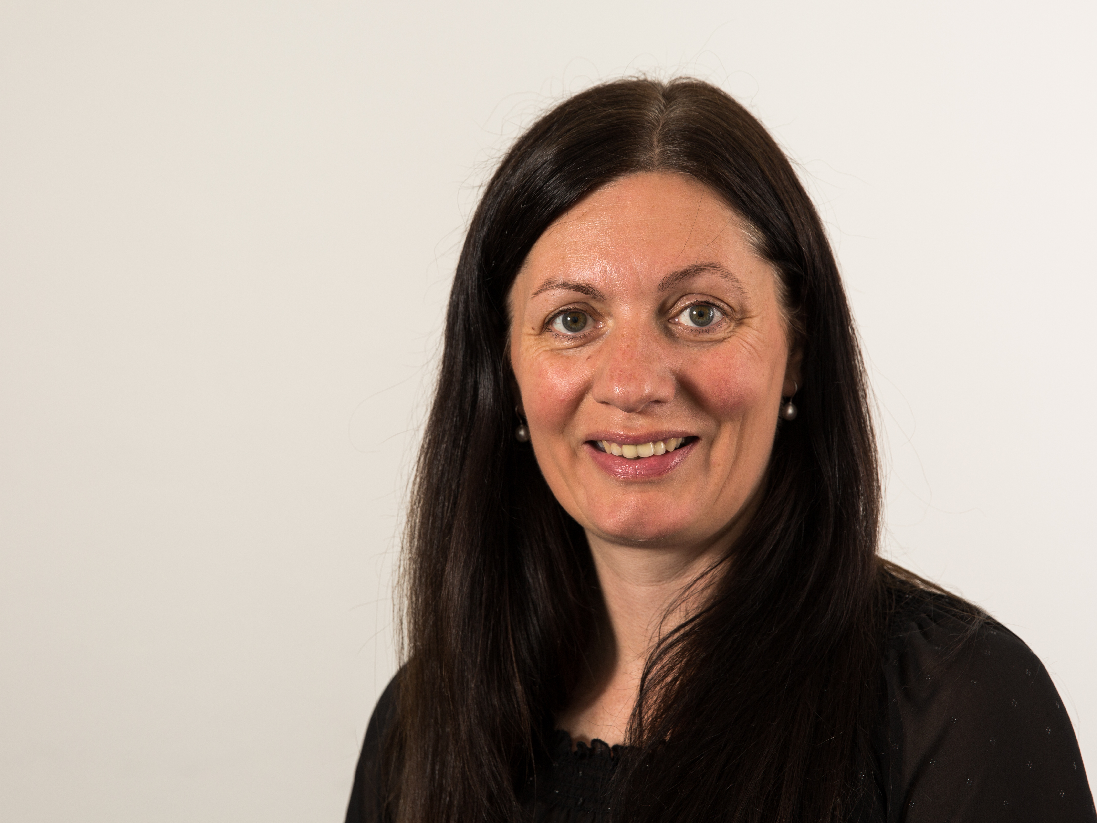 Die saarländische Landtagsabgeordnete Martina Holzner